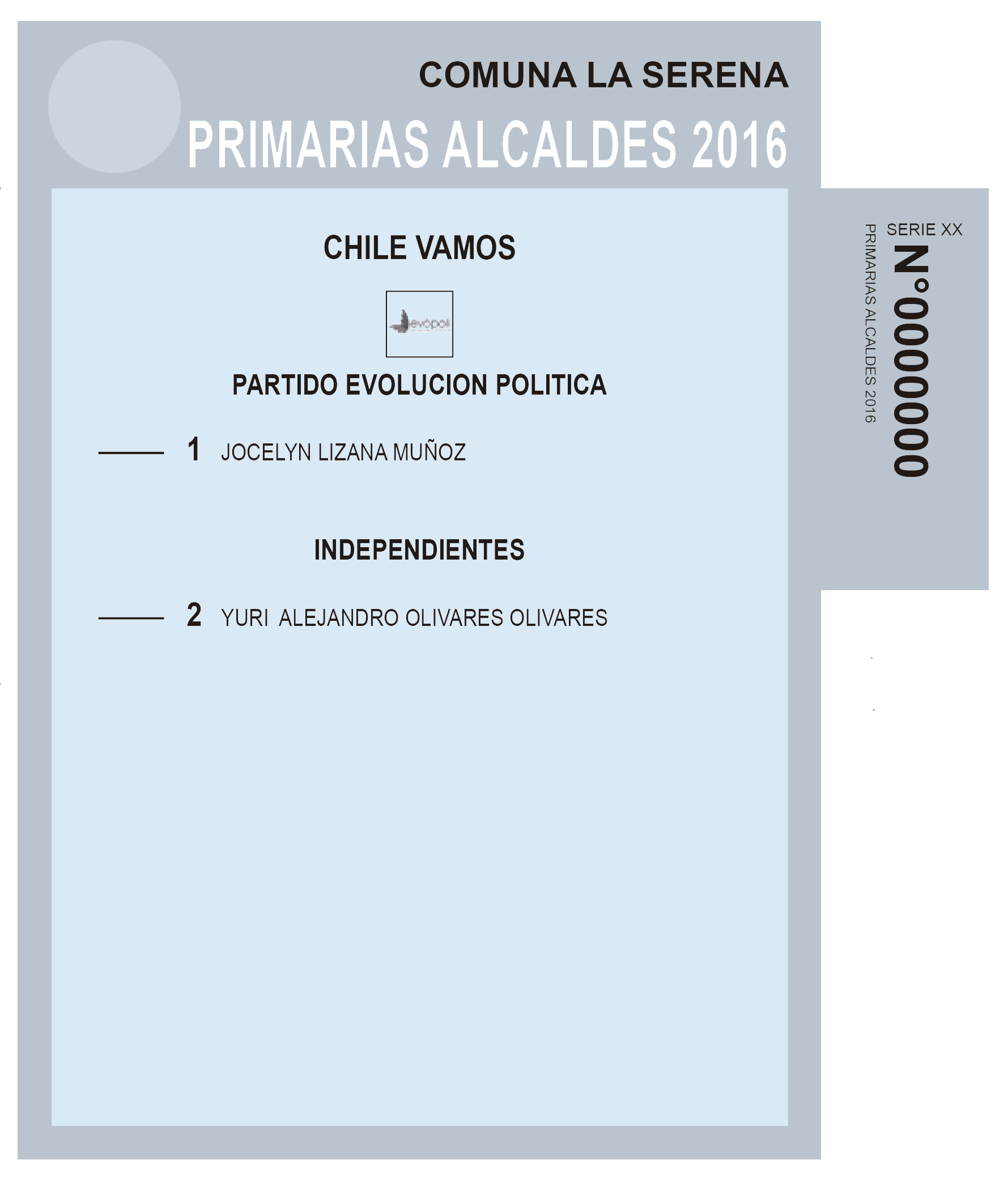 Facsímil de la cédula de votación para las primarias de alcaldes de Chile Vamos en La Serena en 2016.